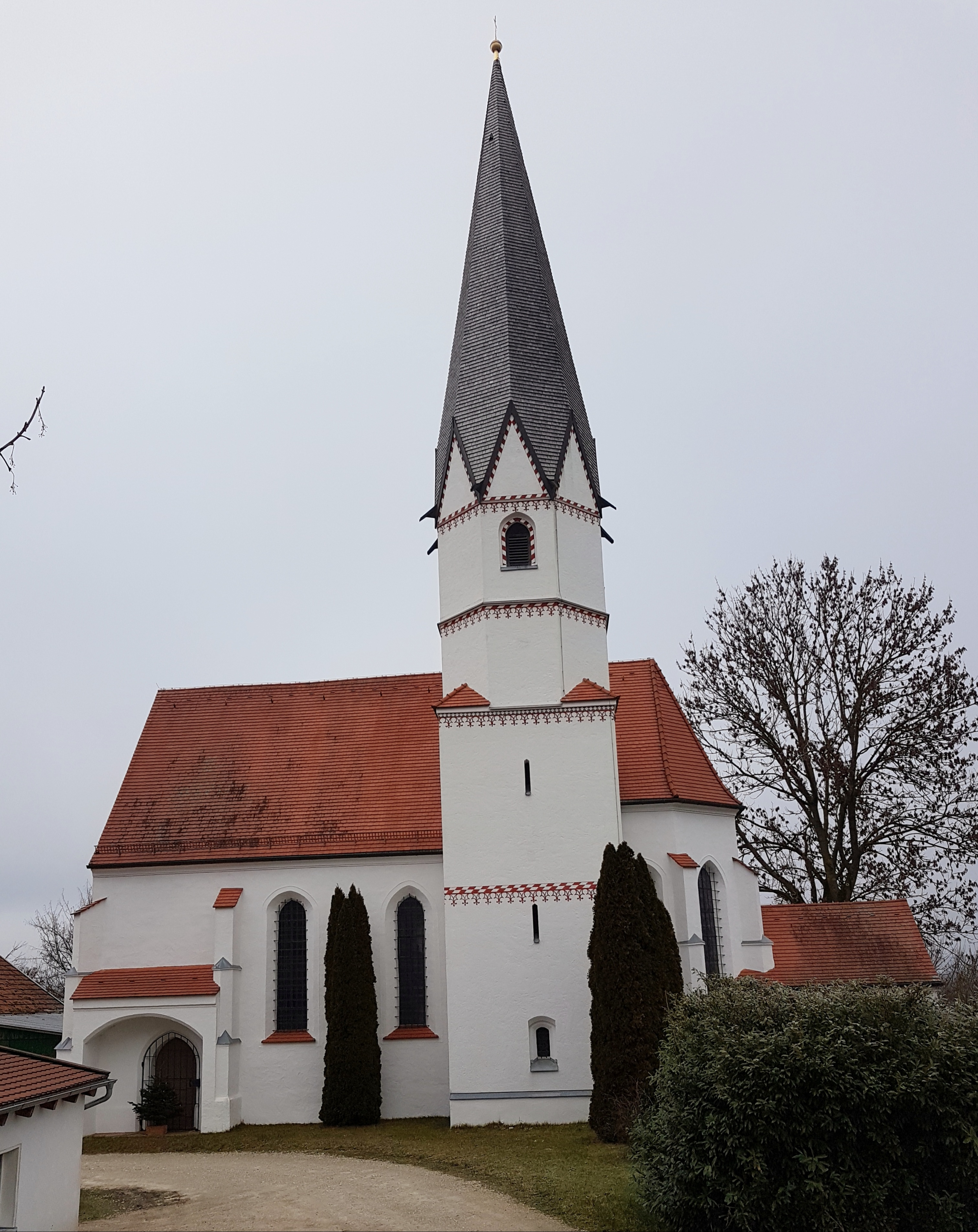 Mühldorf (Petershausen), Wallfahrtskirche St. Ulrich, spätgotischer Bau von 1485.